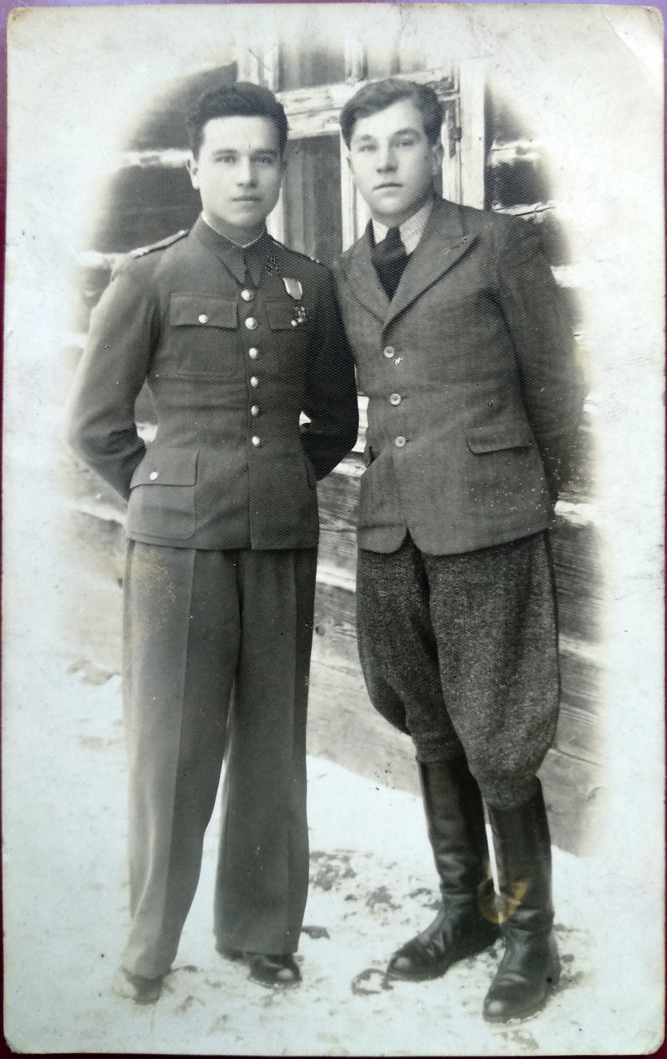 Stanisław Zarzecki (ur. 5 czerwca 1915 r. w Kumiałce, zm. 7 września 1939 r. koło Nowych Grabi) – podoficer Wojska Polskiego II RP, kapral pilot, uczestnik kampanii wrześniowej. Zginął podczas misji bojowej pilotując samolot PZL.23 Karaś. Na zdjęciu z lewej strony, odznaczony Brązowym Krzyżem Zasługi.